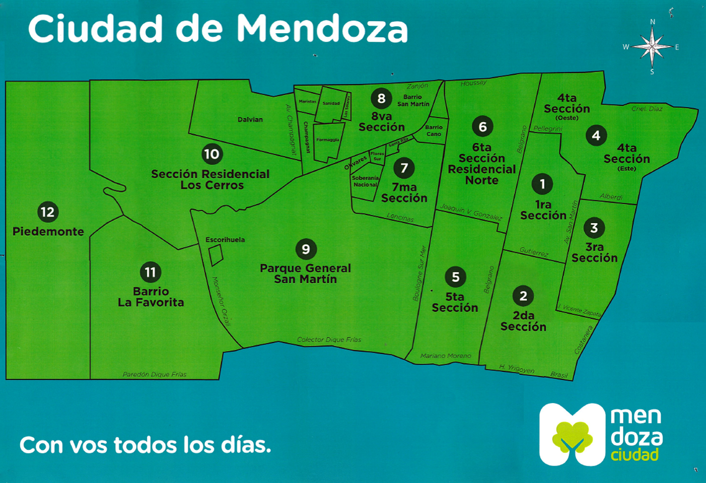 Mapa politico con la separación de la Ciudad de Mendoza.